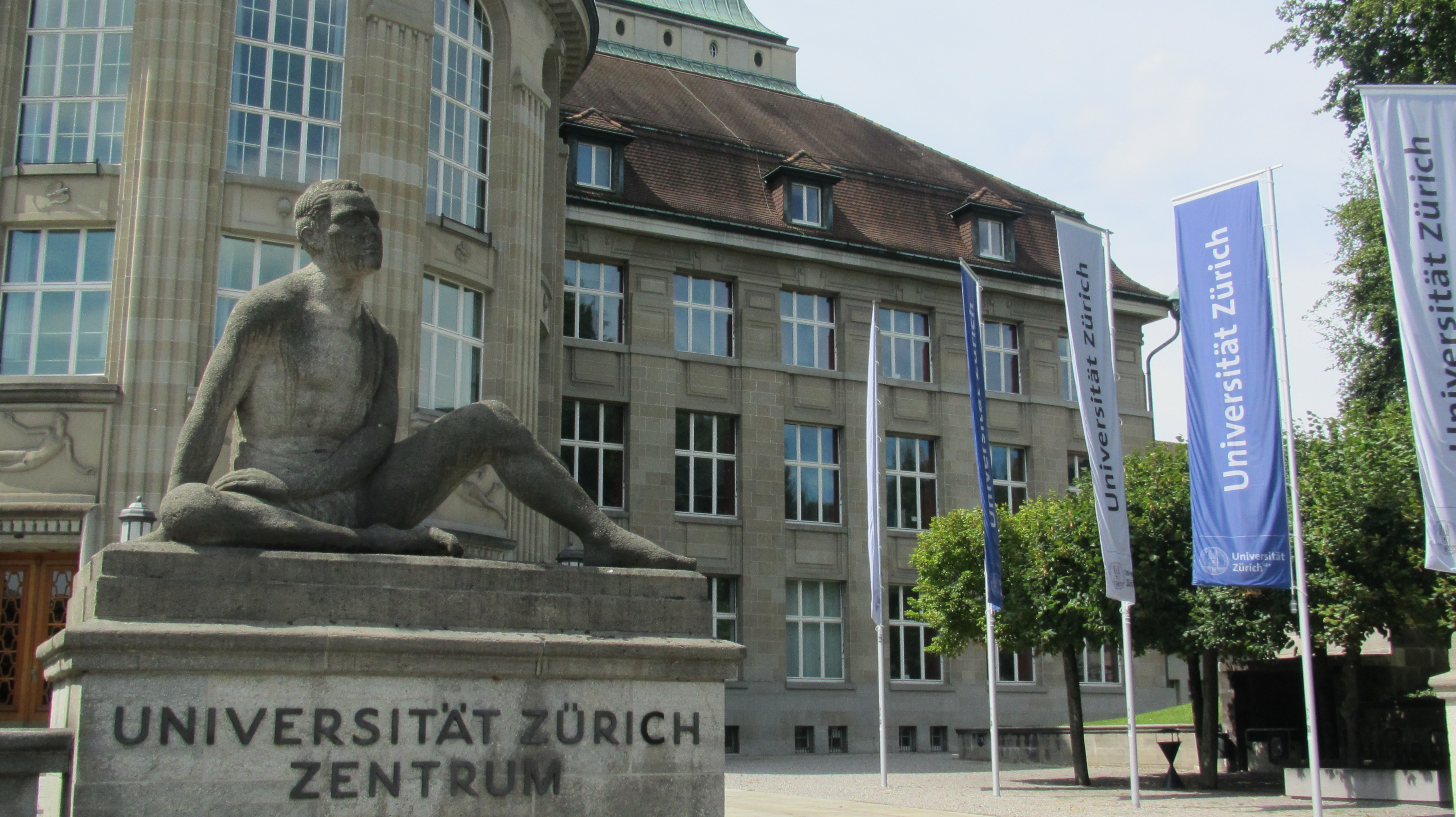 Zürich, Hauptgebäude der Universität Zürich, Rämistrasse 71